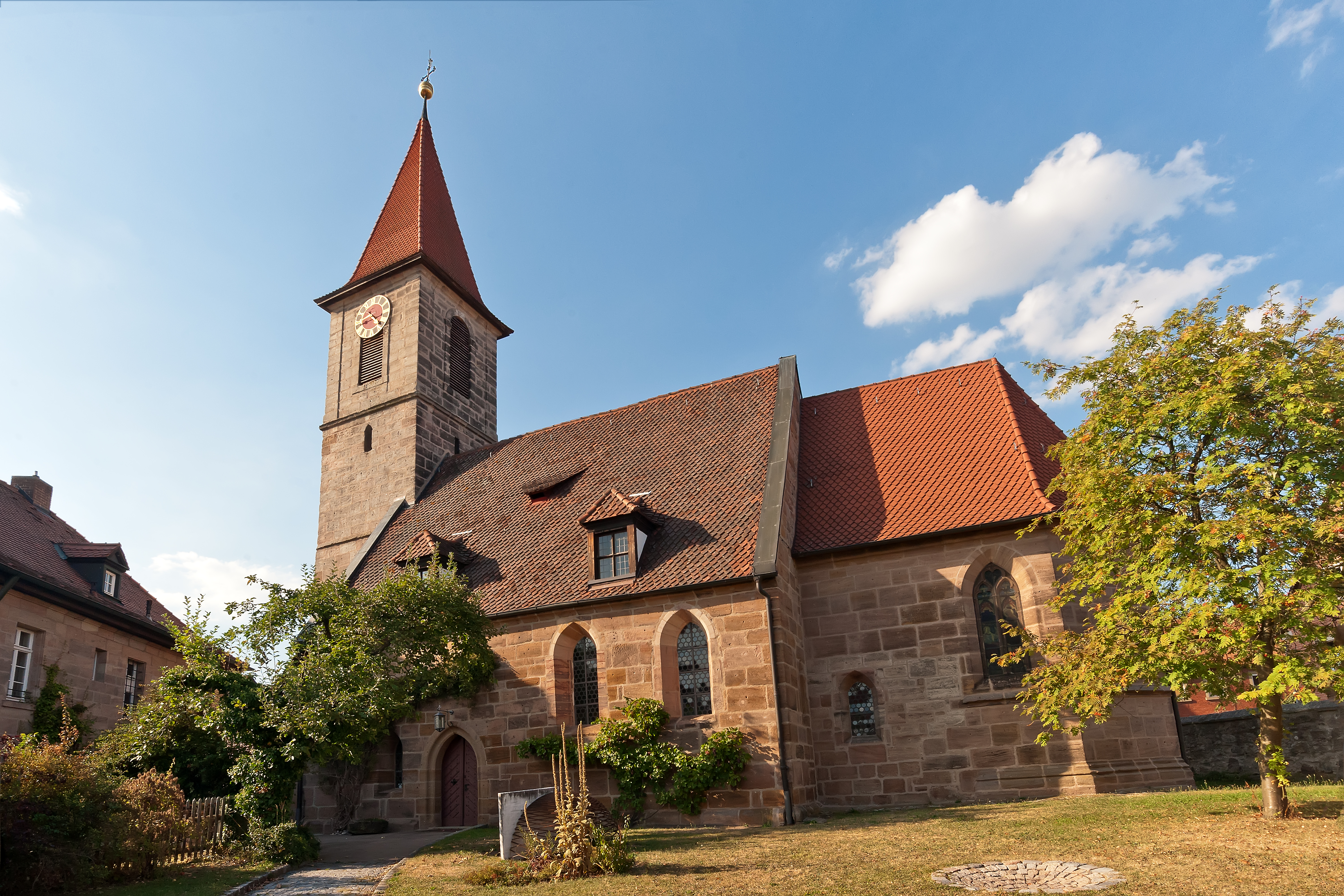 Pfarrkirche St. Katharina, Seukendorf This is a photograph of an architectural monument.